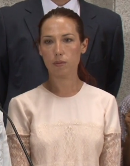 La vicepresidenta del Gobierno de Canarias y consejera de Empleo, Políticas Sociales y Vivienda, Patricia Hernández, presidio hoy en la sede de Presidencia de Gobierno de Las Palmas de Gran Canaria los actos conmemorativos por el Día Internacional del Refugiado, que se enmarcan en la campaña 'SOS Refugiados. Refugio por Derecho'.